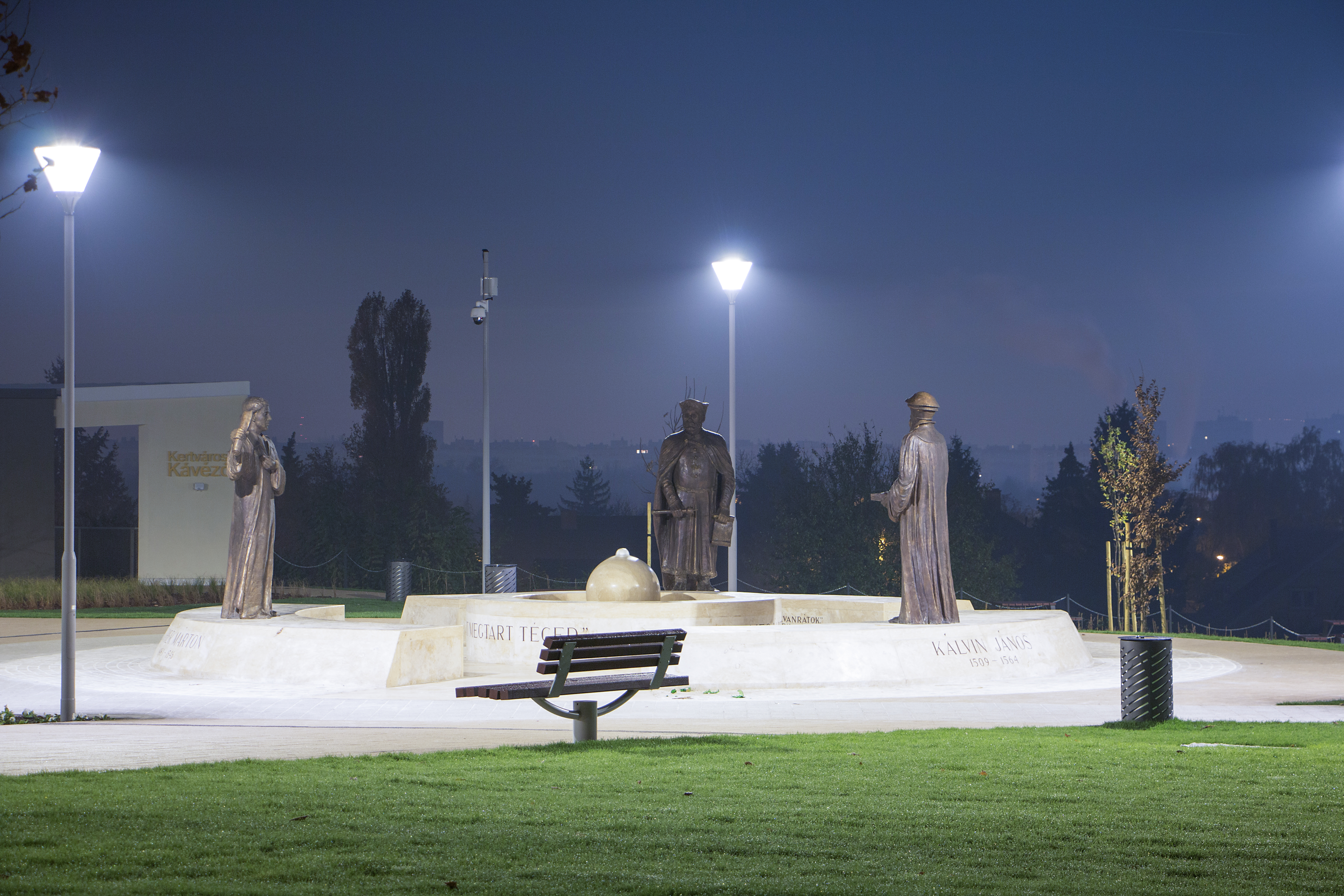 A rákosszentmihályi reformáció-emlékmű hajnalban